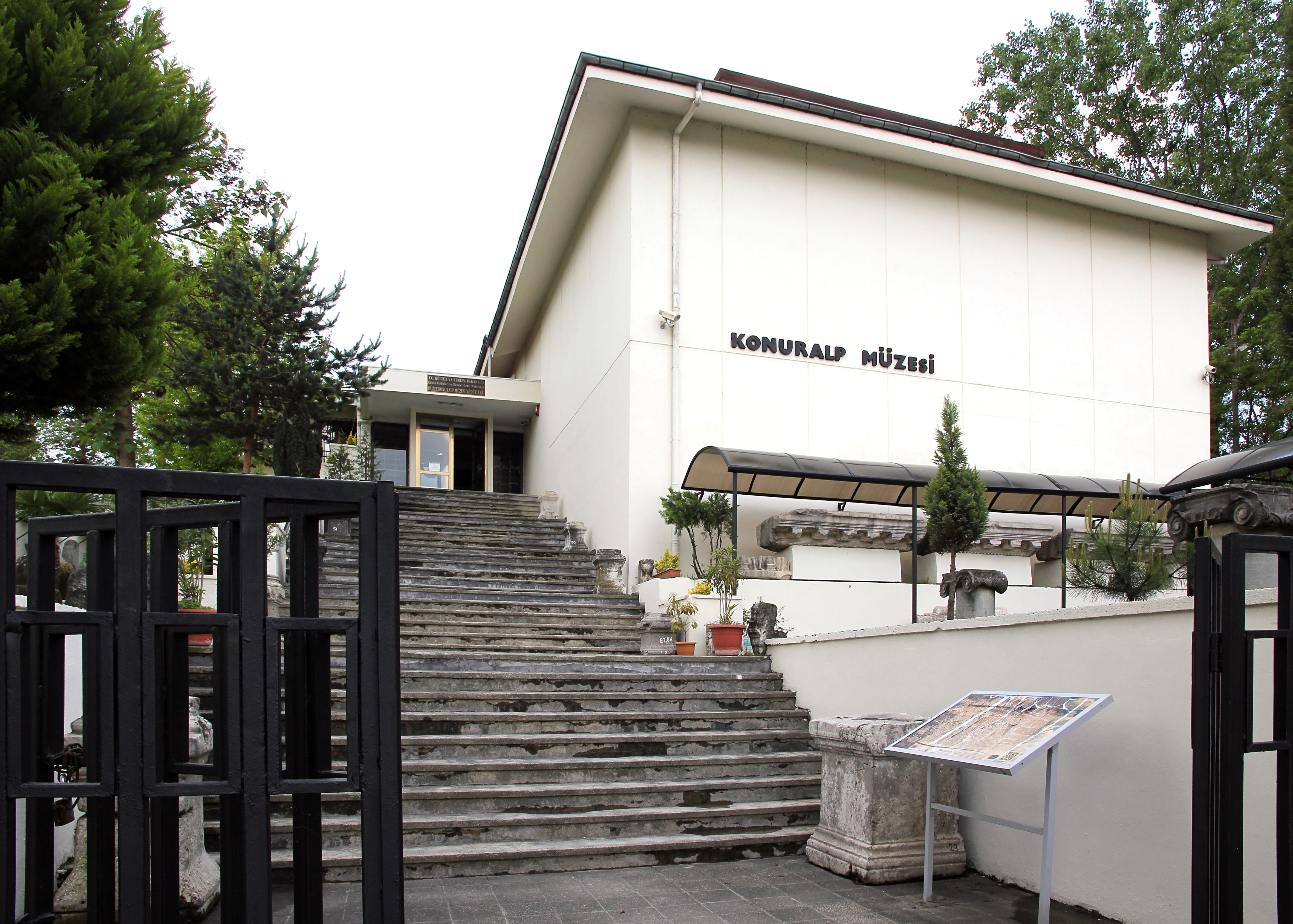 Prusias ad Hypium, antike bithynische Stadt bei Konuralp, Provinz Düzce, Nordwesttürkei, Konuralp-Museum